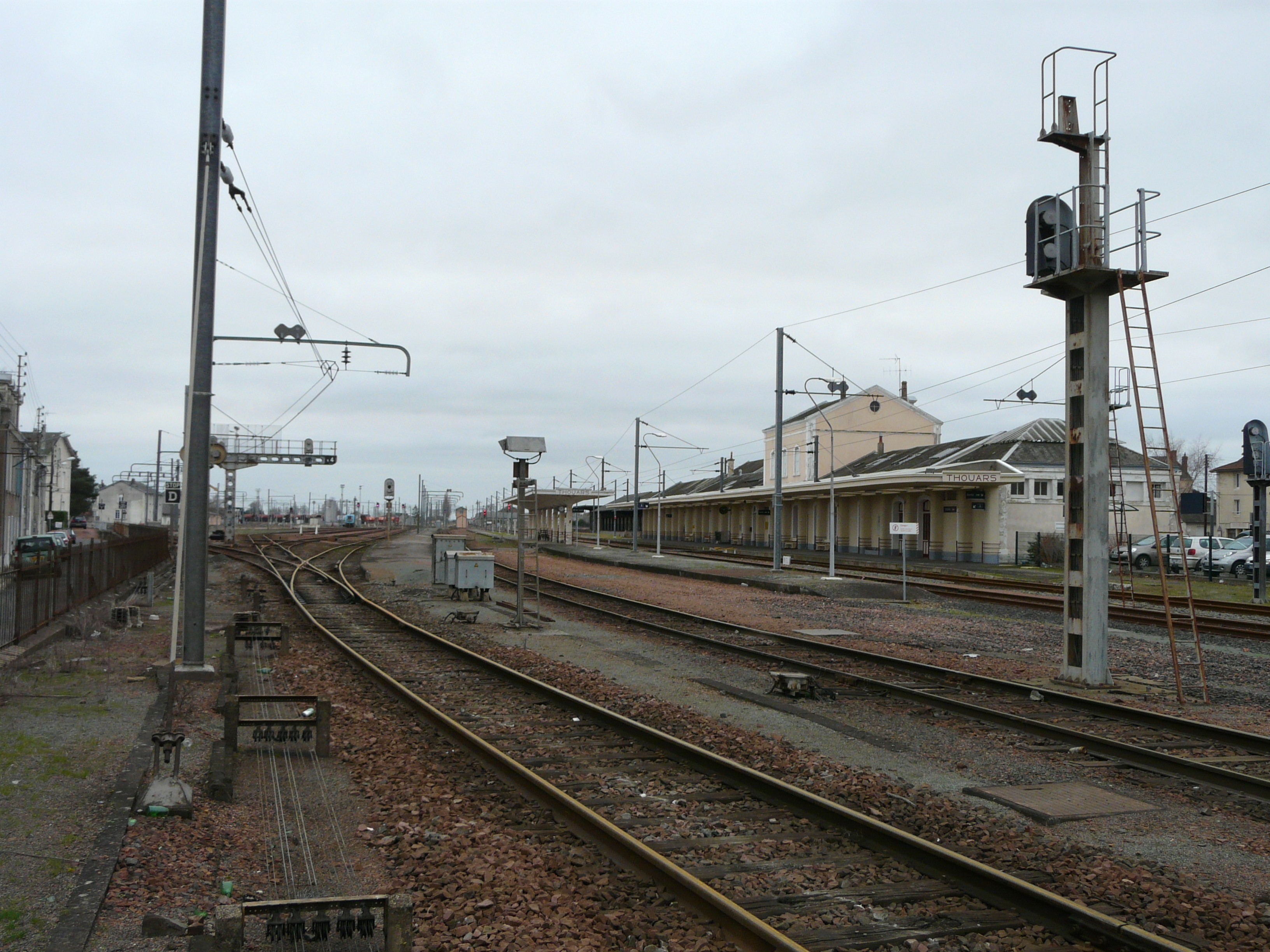 La gare de Thouars, Deux-Sèvres, France.